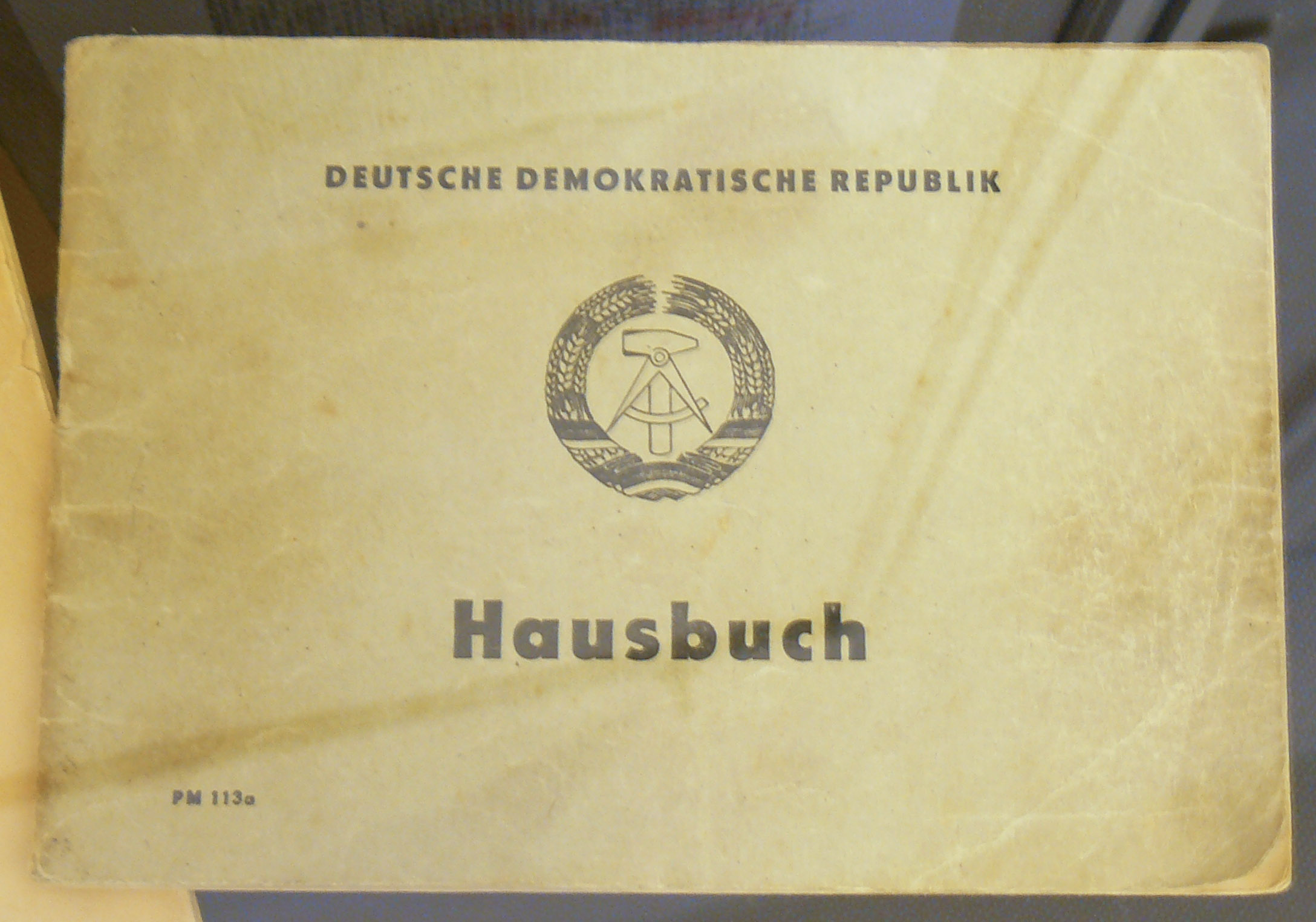 Hausbuch im Stasimuseum Runde Ecke mit neuem Staatswappen